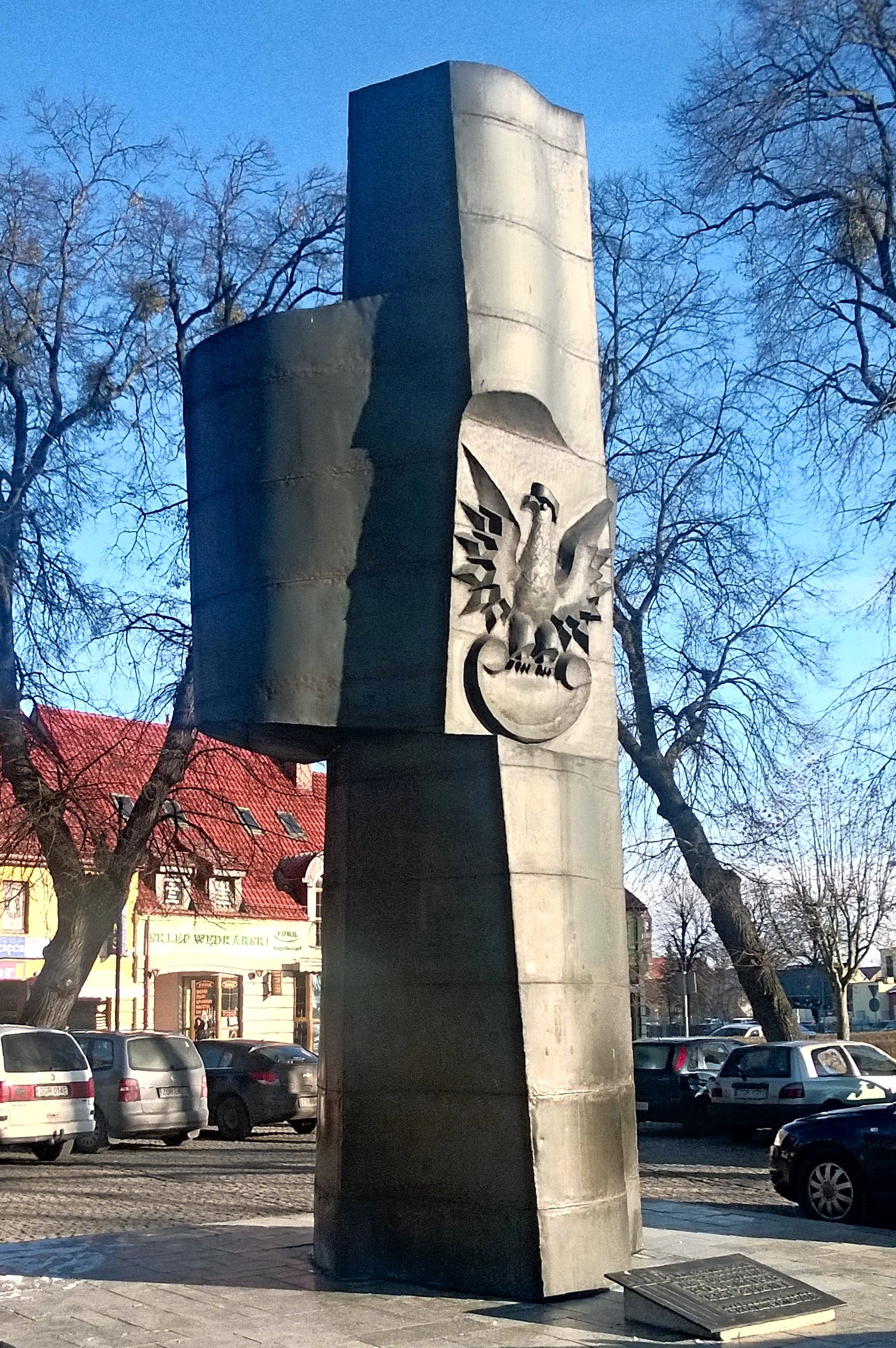 Chojna, Poland